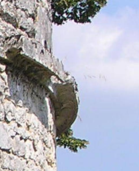 Corniche de défense dite randière ou larmier du pigeonnier de Richemont